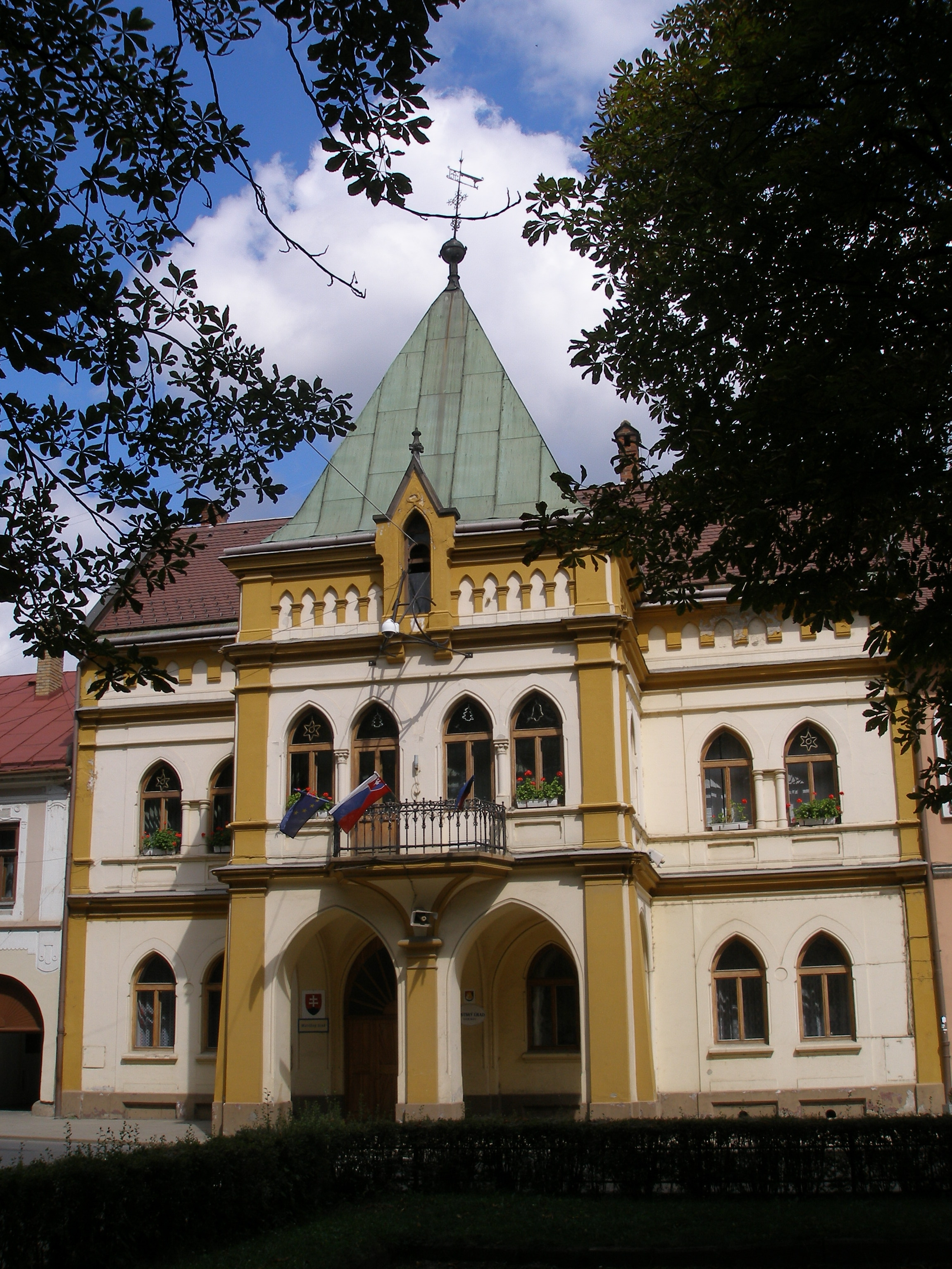 Sabinov starobylé bývalé slobodné kráľovské mesto. Dnes okresné mesto v regióne Šariš. Budova miestnej radnice.